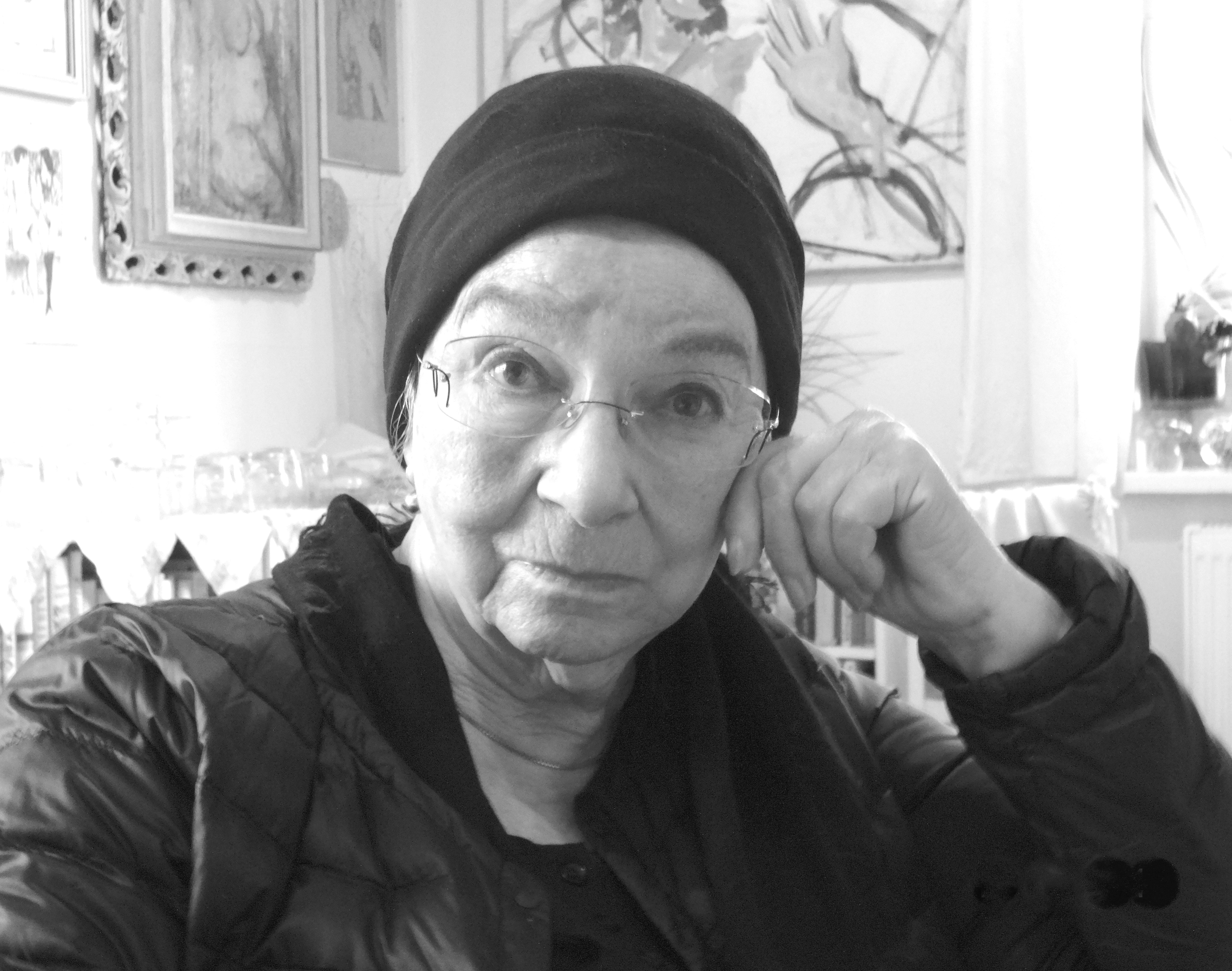 Foto-Portrait von Marianne Kühn-Berger